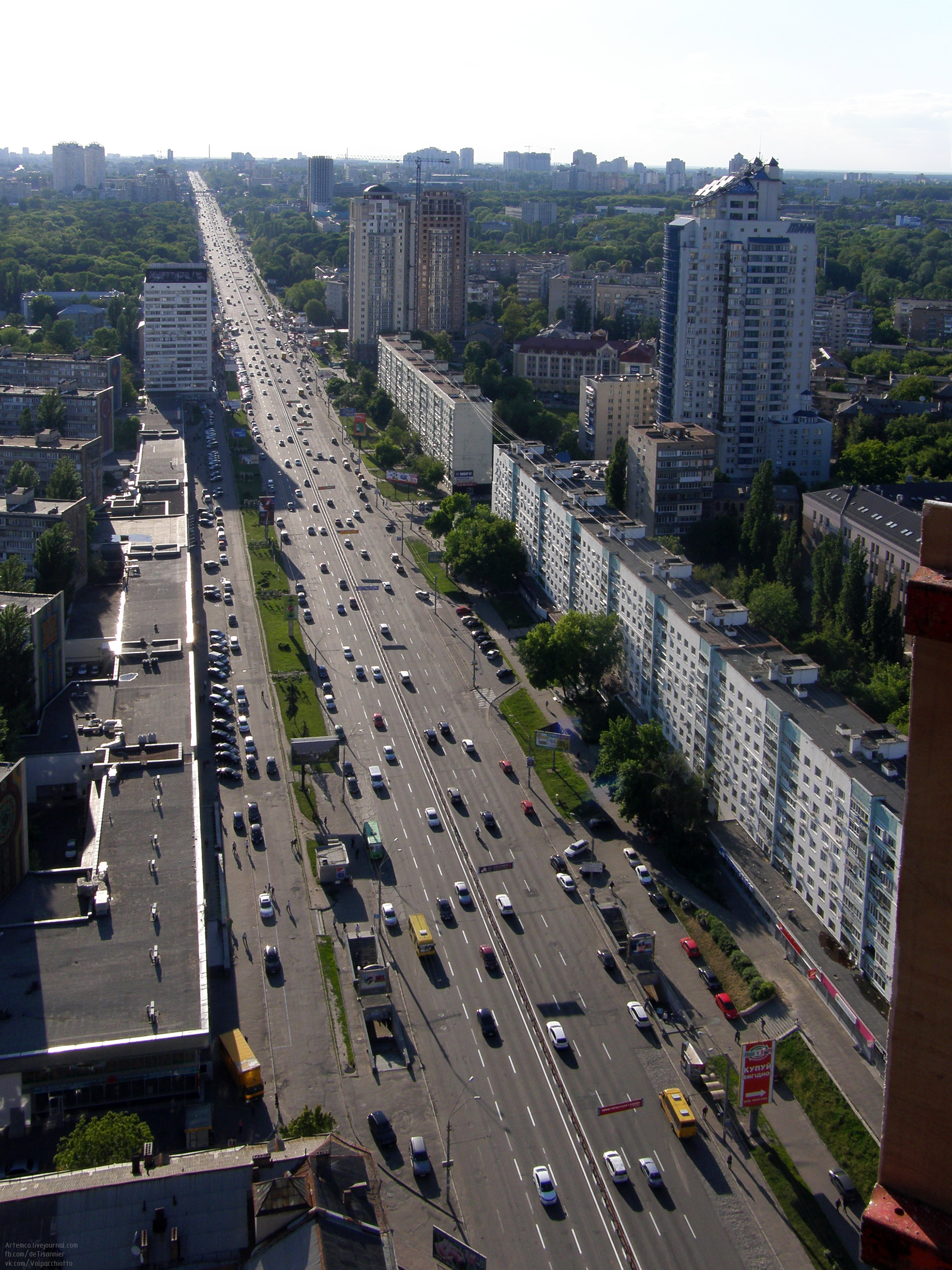 проспект Победы на запад от Sky Towers